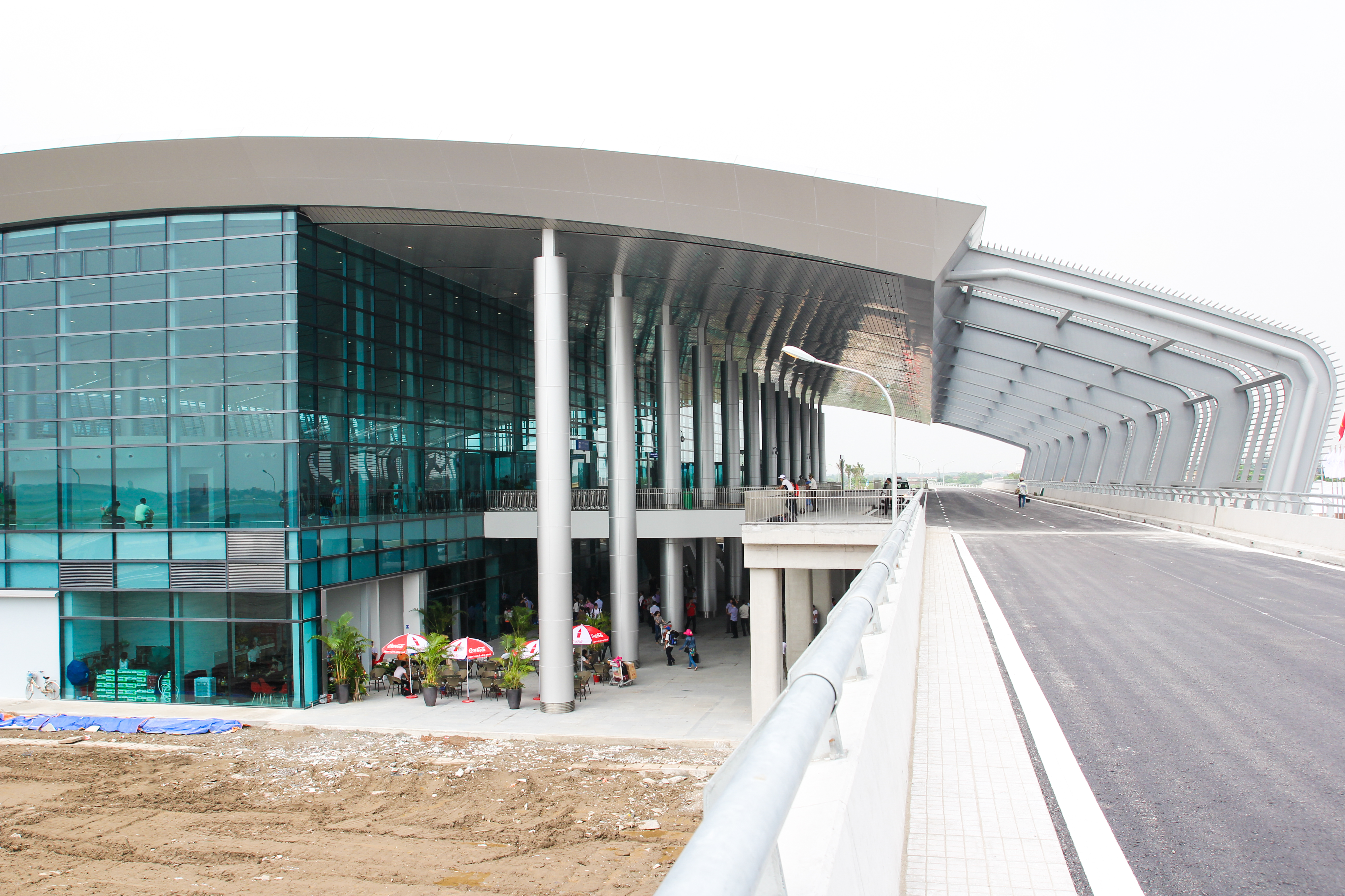 Ga đi cảng hàng không Cát Bi